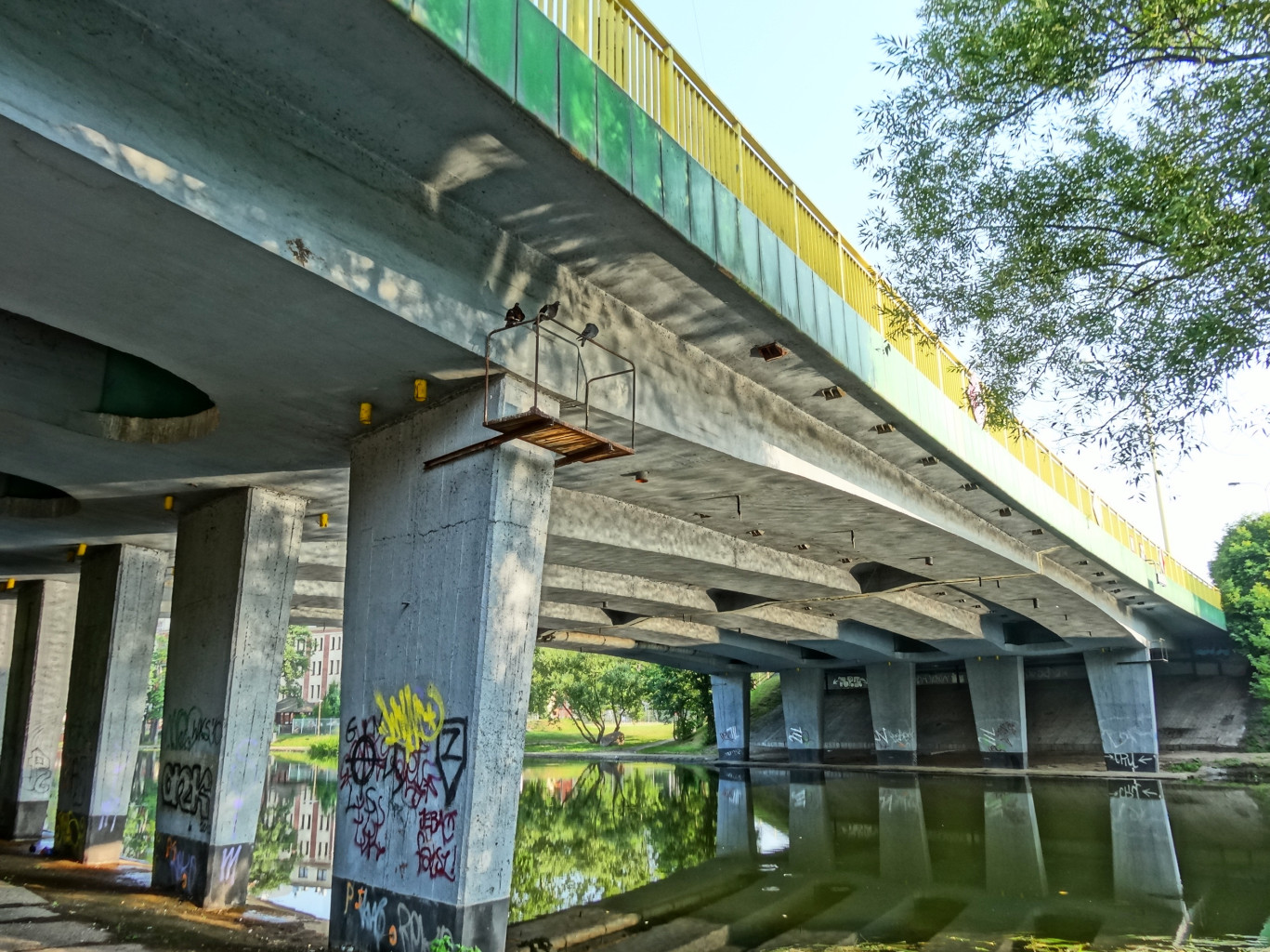 Most Pomorski nad Brdą w Bydgoszczy